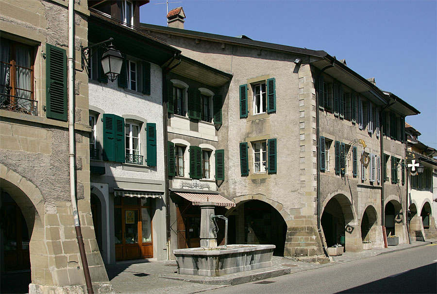 Häuser mit Arkaden an der Grande-Rue in Coppet